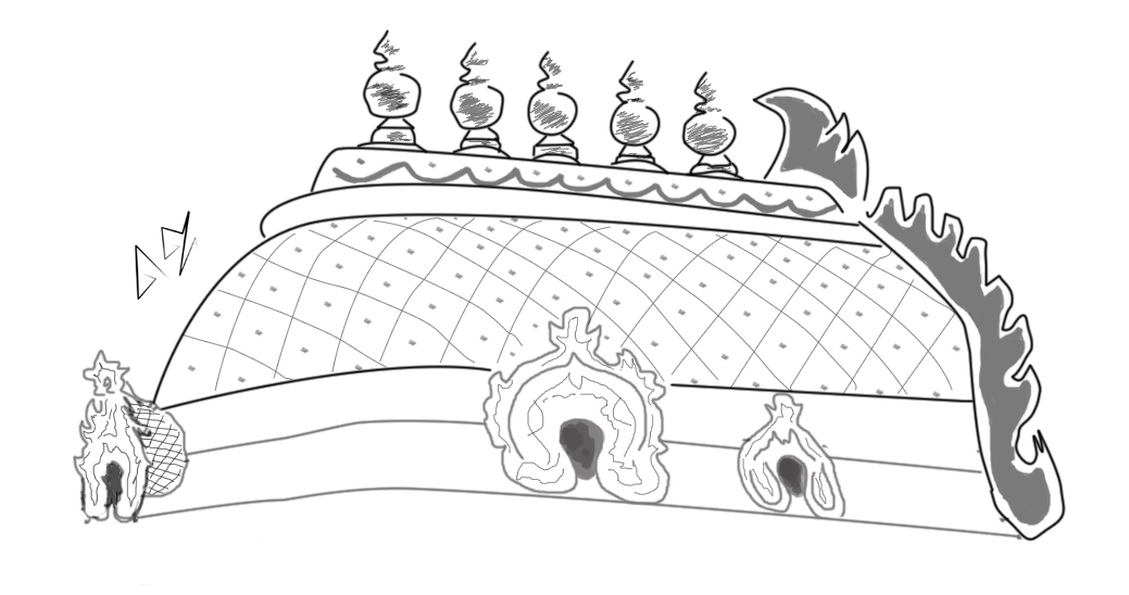 யானையின் முதுகினைப் போன்று தோற்றம் அளிக்கும் ஆலக்கோயில் கோபுரம்